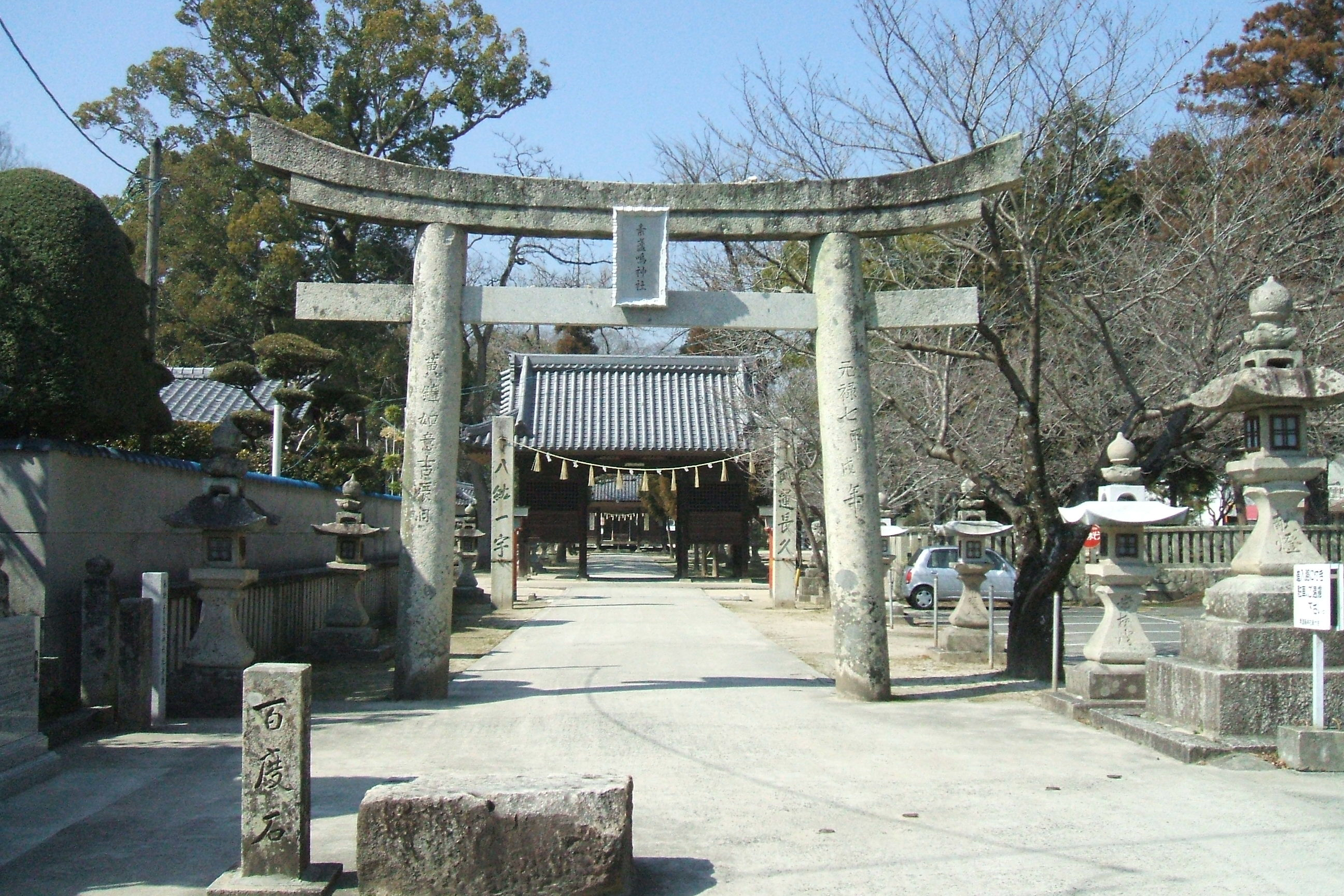 広島県福山市にある素盞嗚神社の鳥居